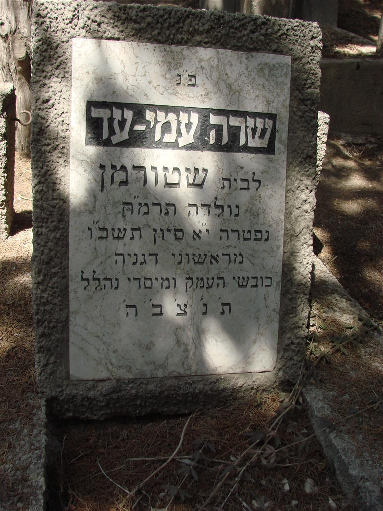 שרה עמיעד שטורמן